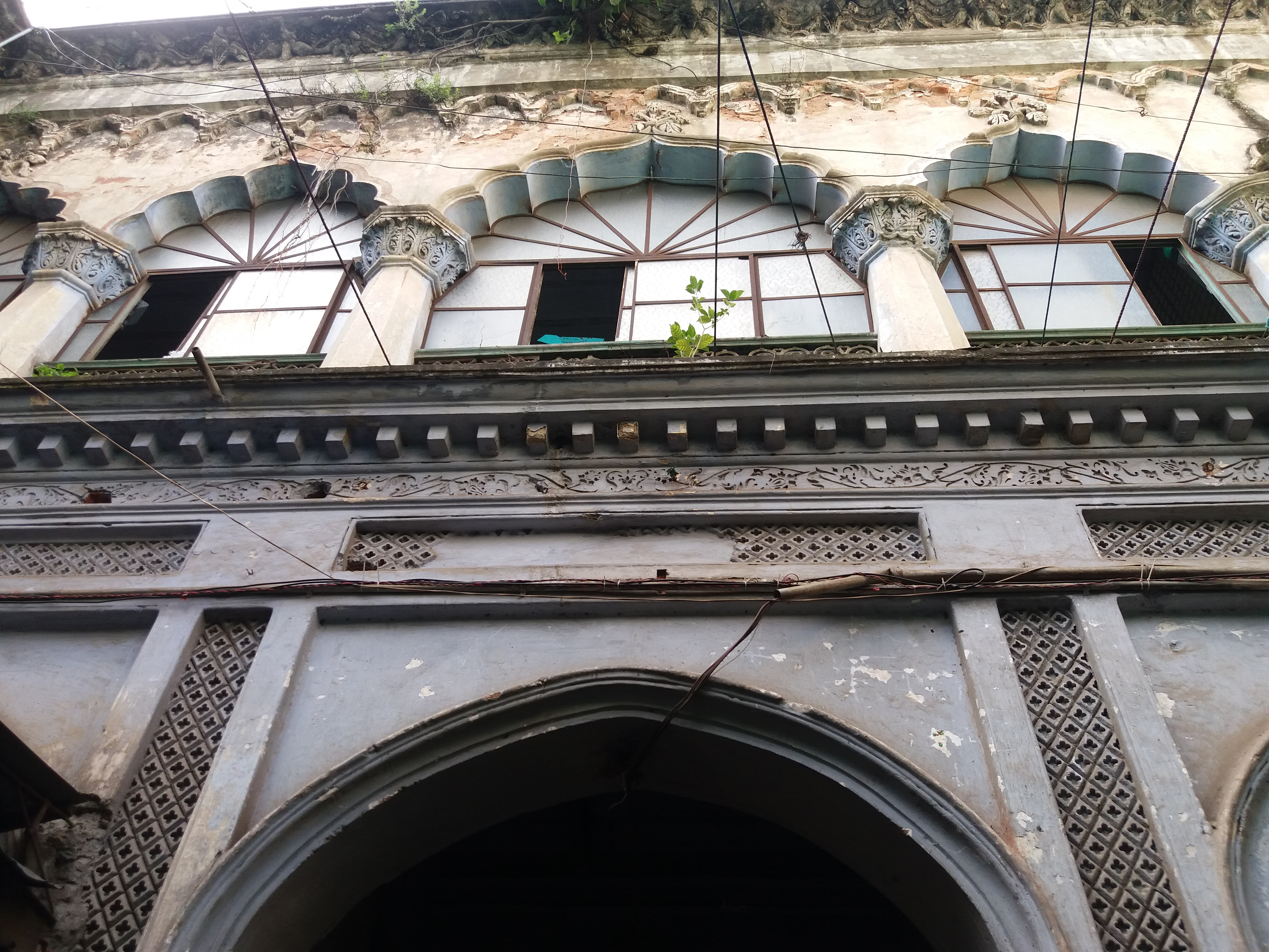 শঙ্খনিধি হাউজ